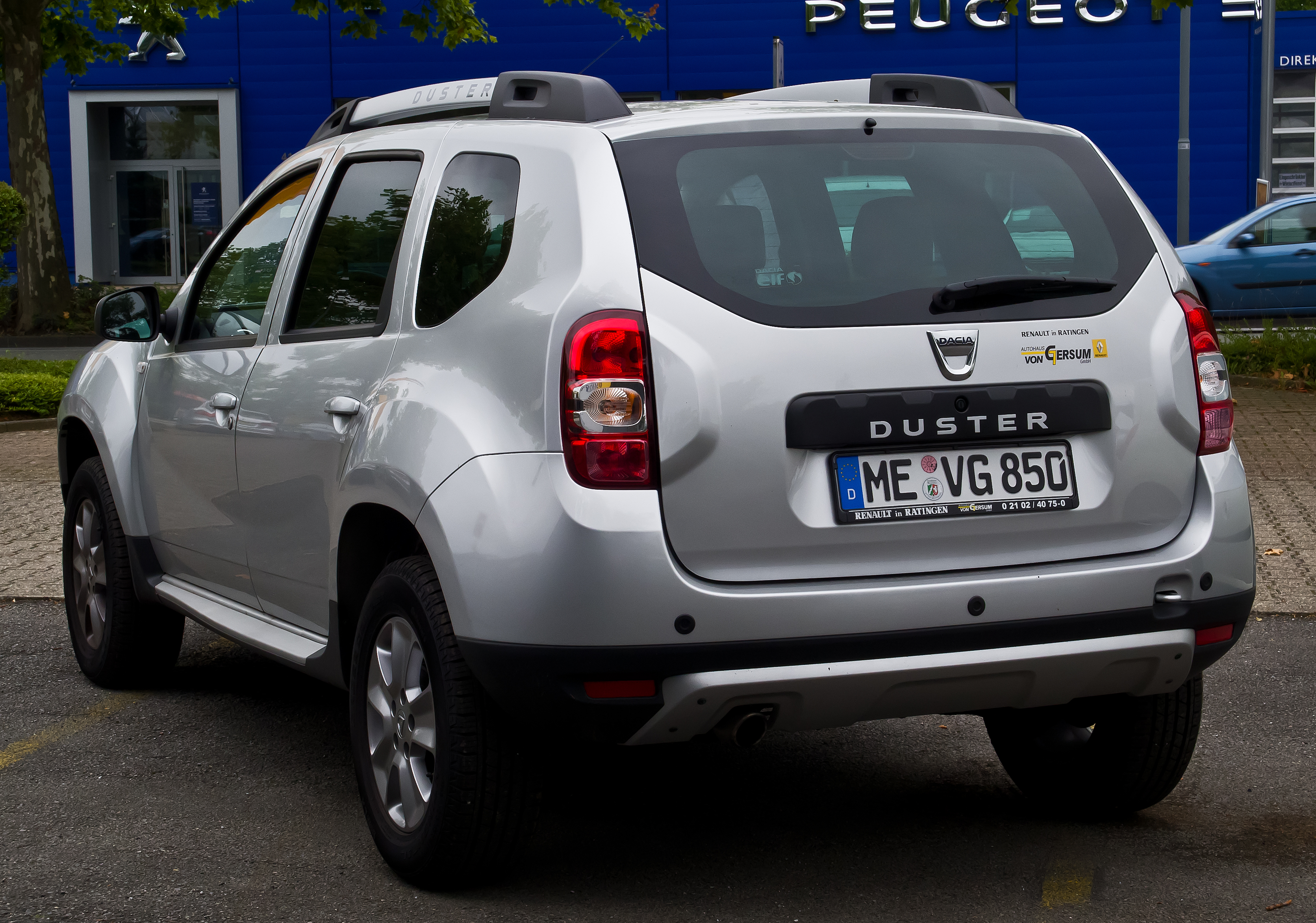 Dacia Duster TCe 125 4x2 Prestige (Facelift)